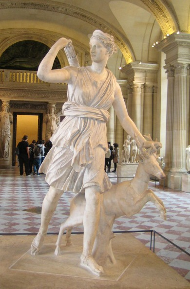 Artemis (Louvre Paris)